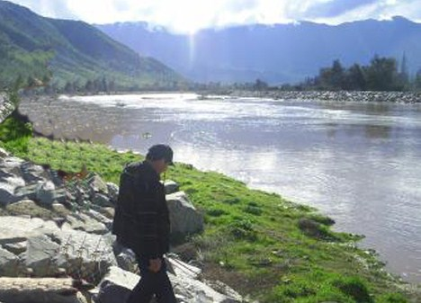 Estero Lampa en invierno, Chile